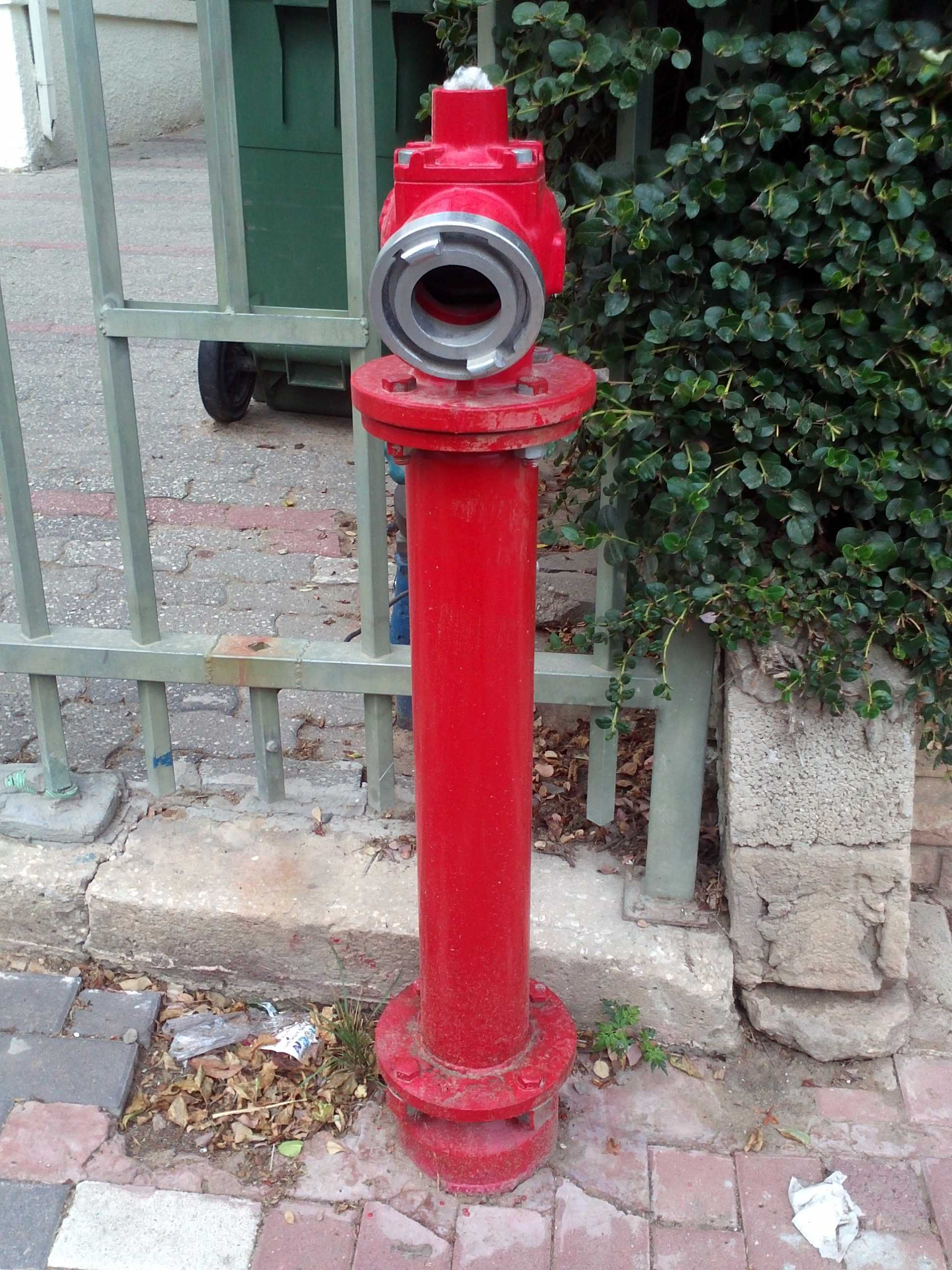 Пожарный гидрант в Петах-Тикве